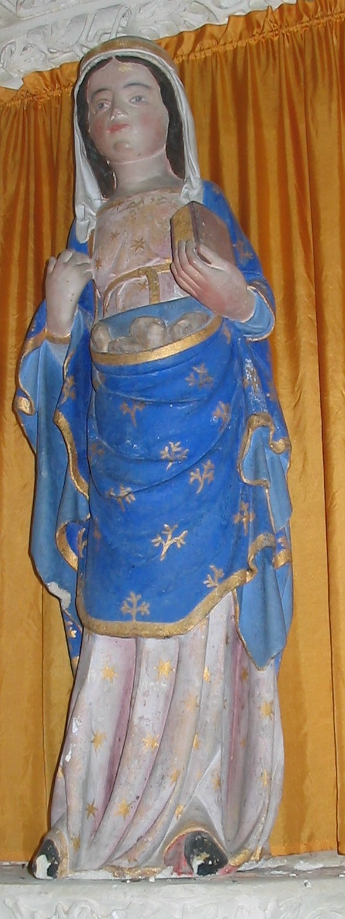 Statue de Ste Emerance, chapelle de la Pouëze (49)